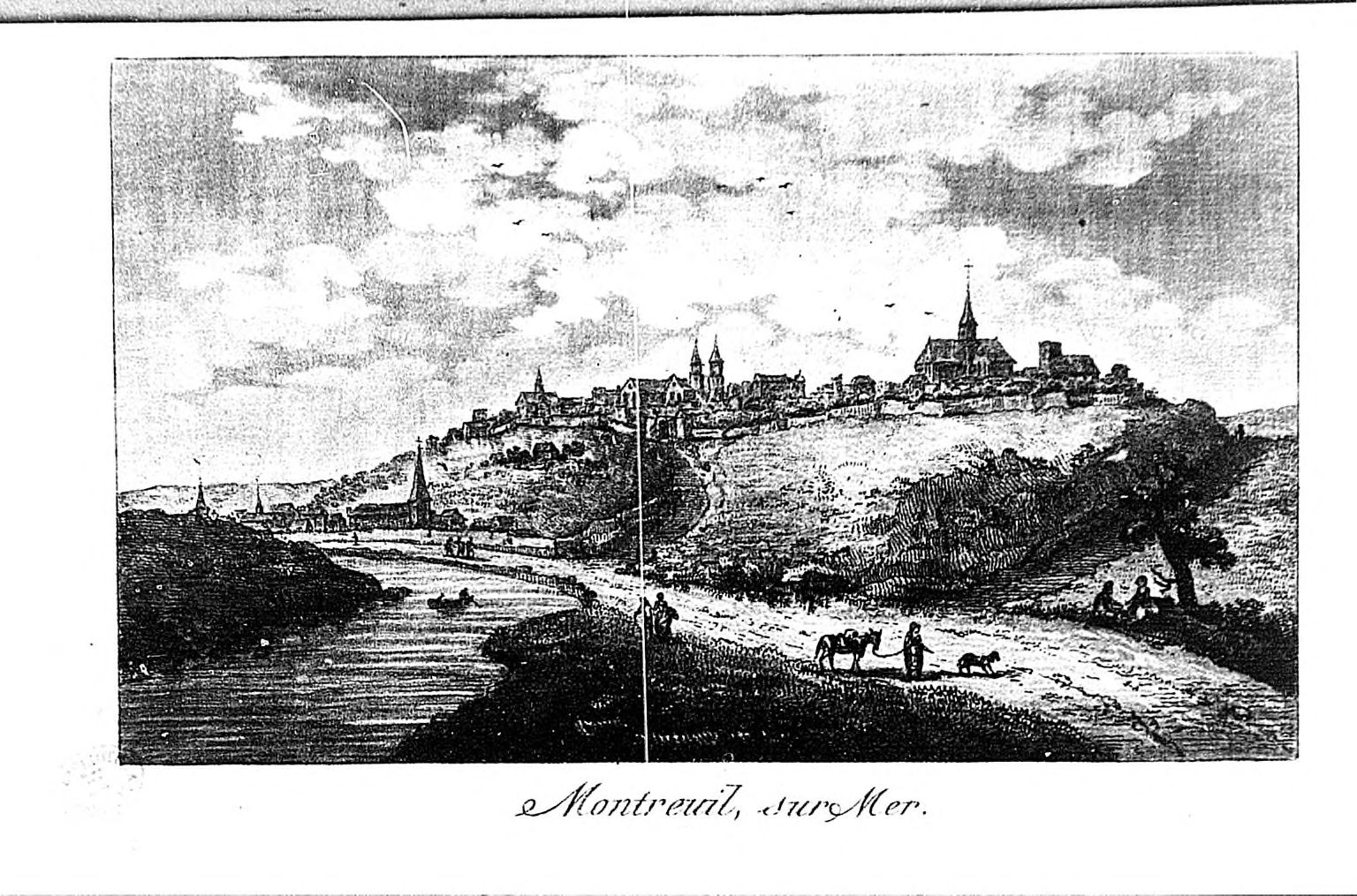 Montreuil-sur-Mer.